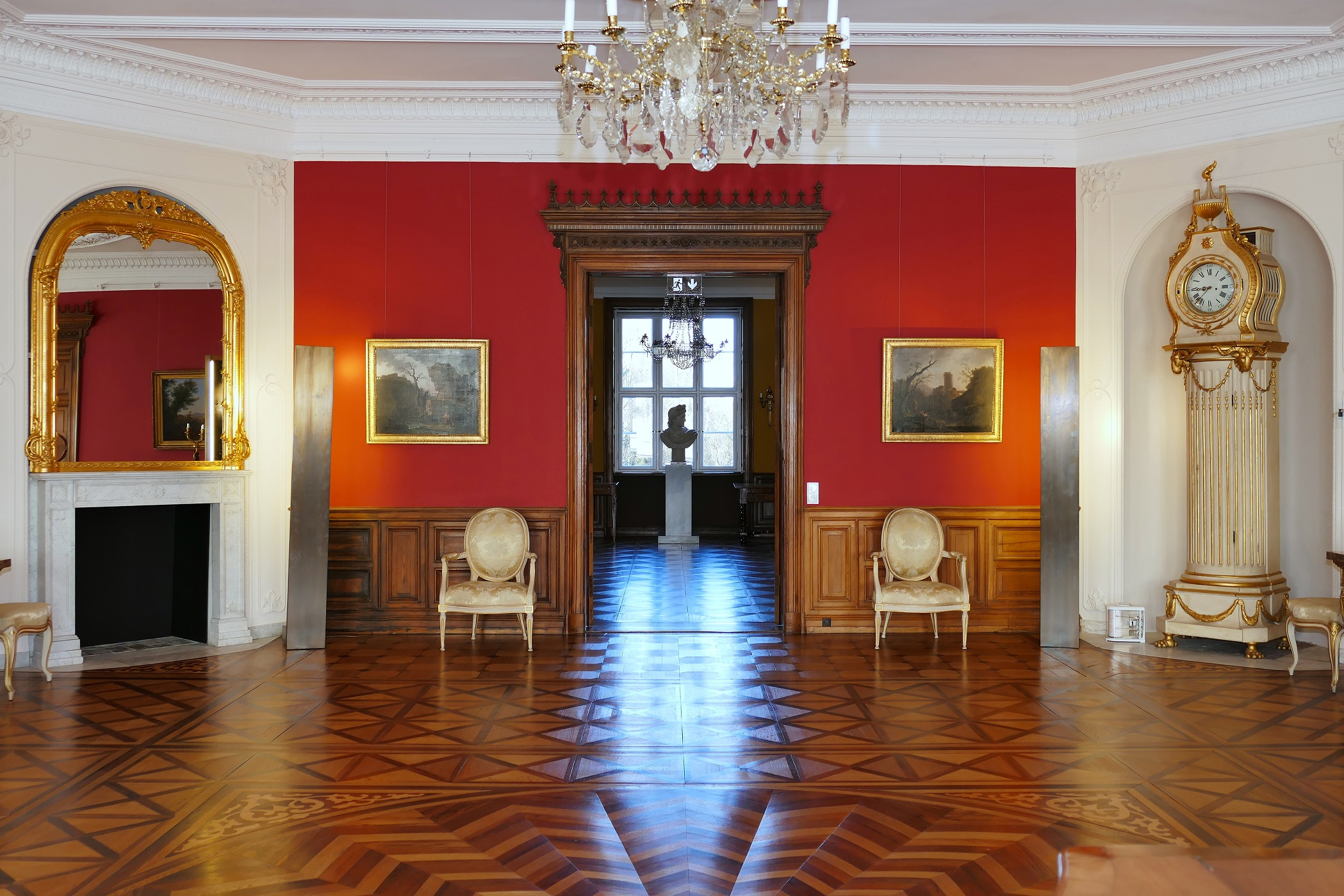 Festsaal des Schlosses